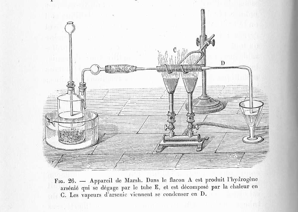 Appareil de Marsh, pour le dosage de l'arsenic dans les tissus.